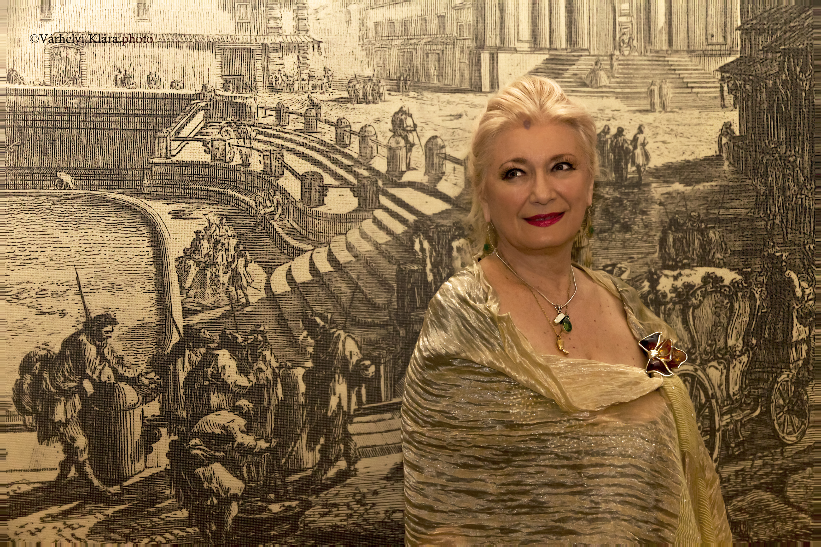 Sass Sylvia magyar operaénekes